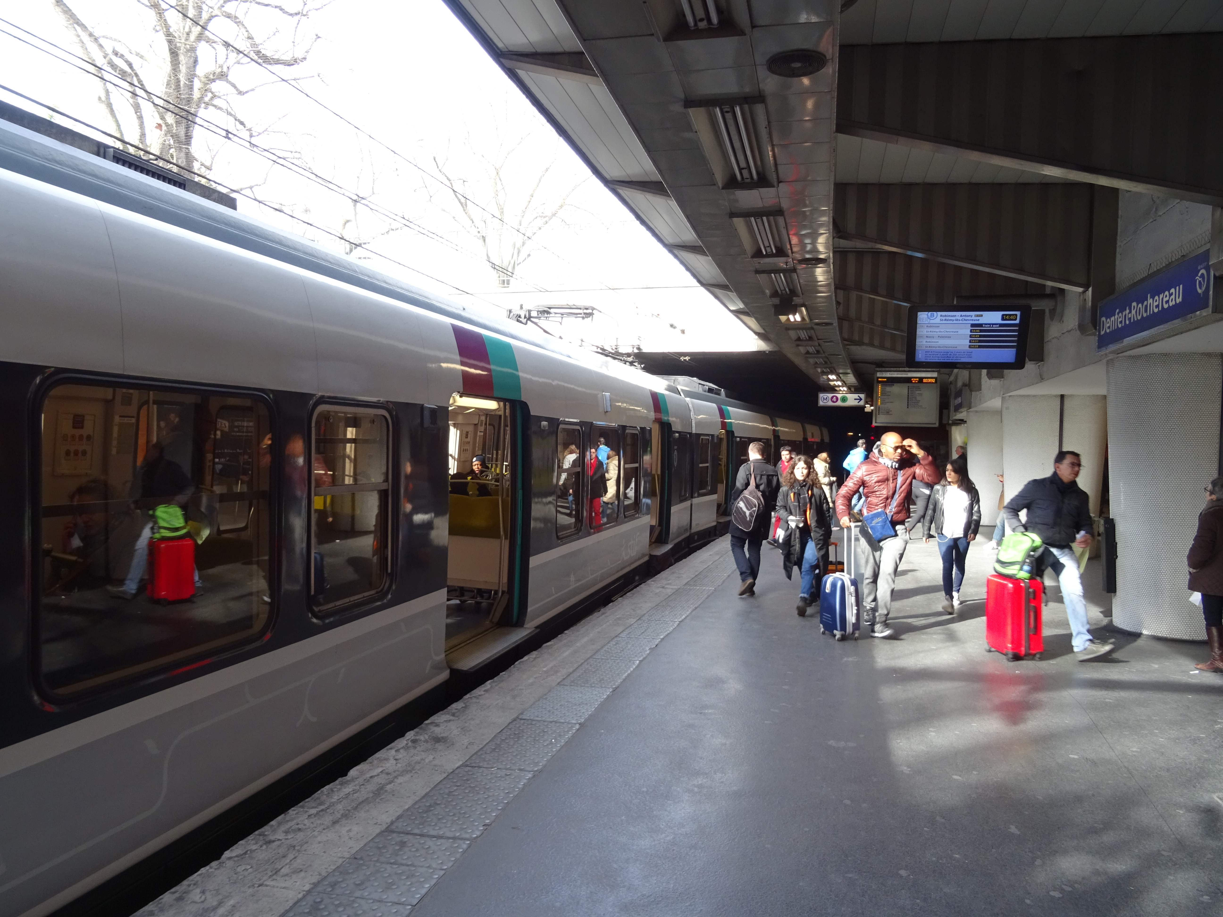 MI79 rénové en gare de Denfert-Rochereau